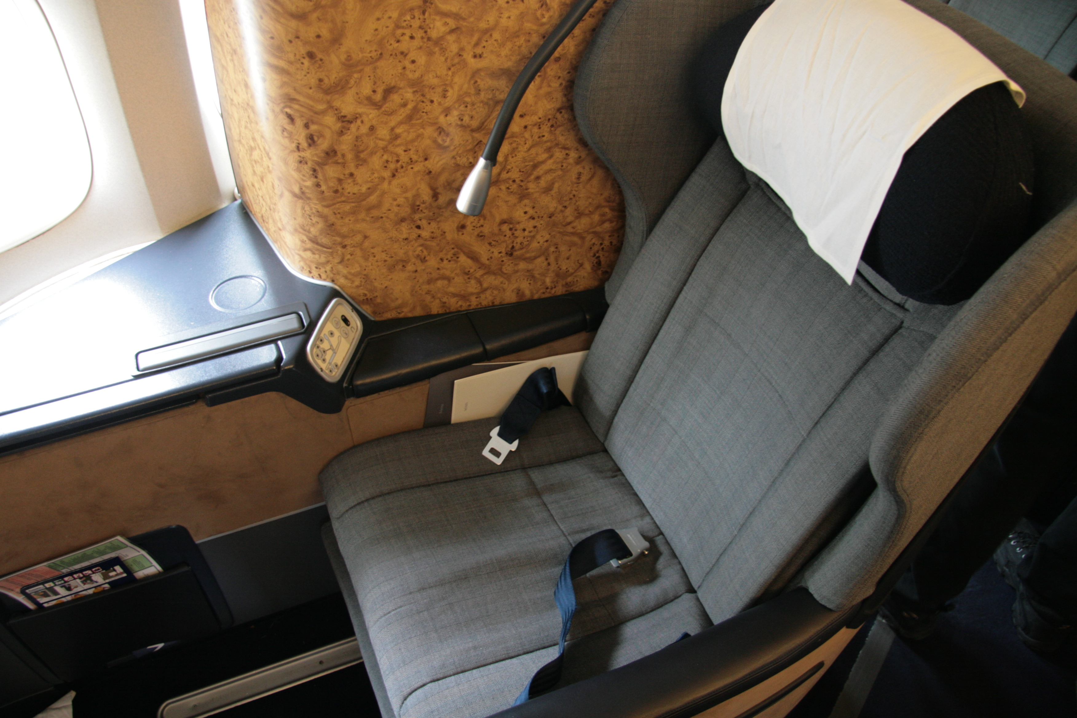 BA First